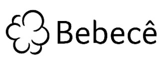 Logotipo Bebecê 2011